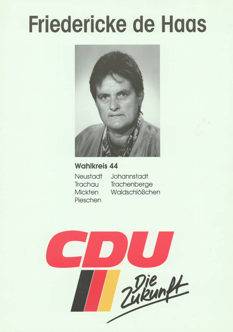 Friedericke de Haas Wahlkreis 44 ... CDU Die Zukunft Abbildung: Porträtfoto Plakatart: Kandidaten-/Personenplakat mit Porträt Objekt-Signatur: 10-035 : 4 Bestand: Landtagswahlplakate Sachsen (10-035) GliederungBestand10-18: Landtagswahlplakate Sachsen (10-035) » CDU Lizenz: KAS/ACDP 10-035 : 4 CC-BY-SA 3.0 DE